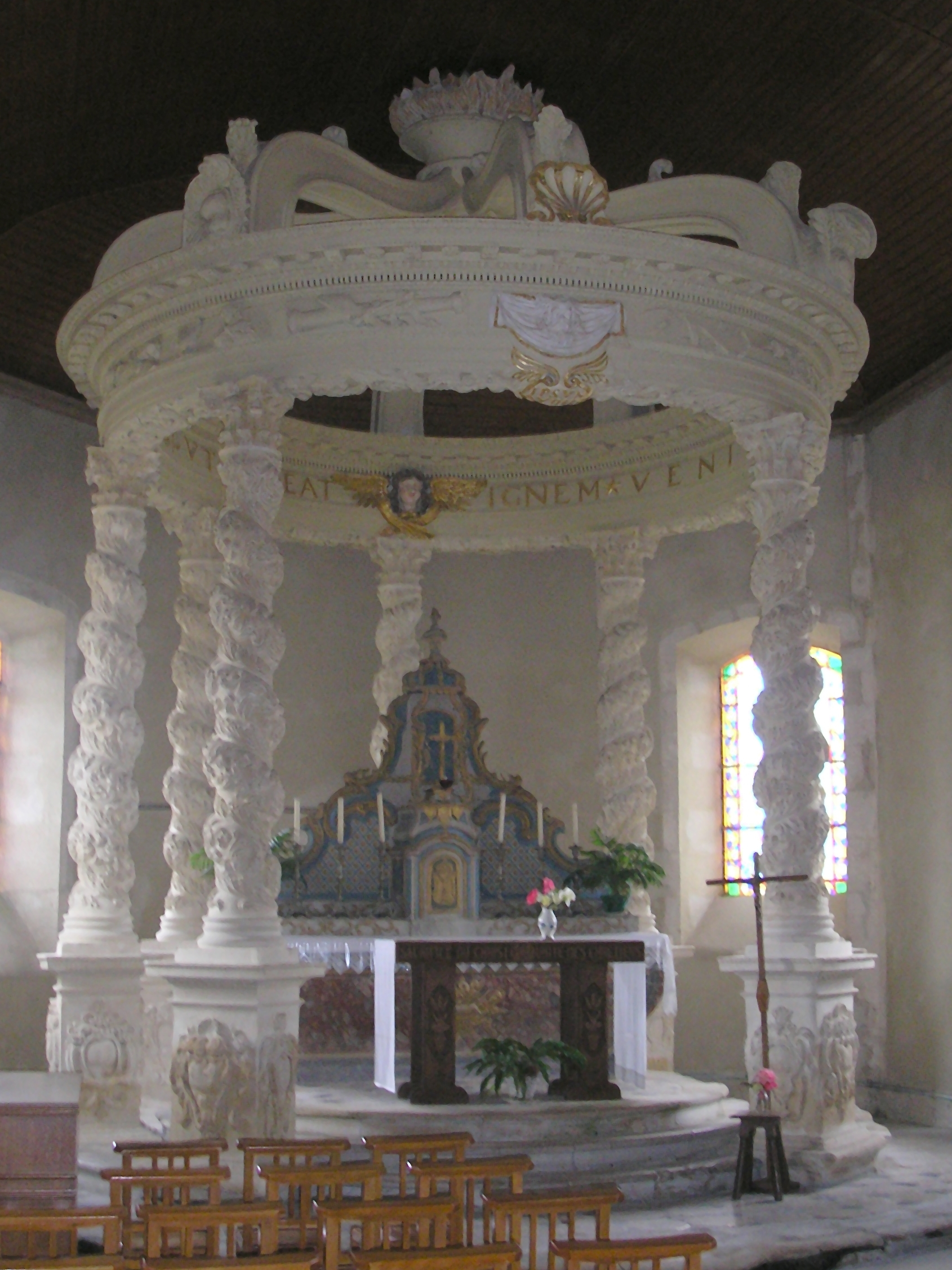 Pierrefitte-en-Cinglais (Normandie, France). Le ciborium (baldaquin) de l'église Saint-Pierre-et-Saint-Paul.